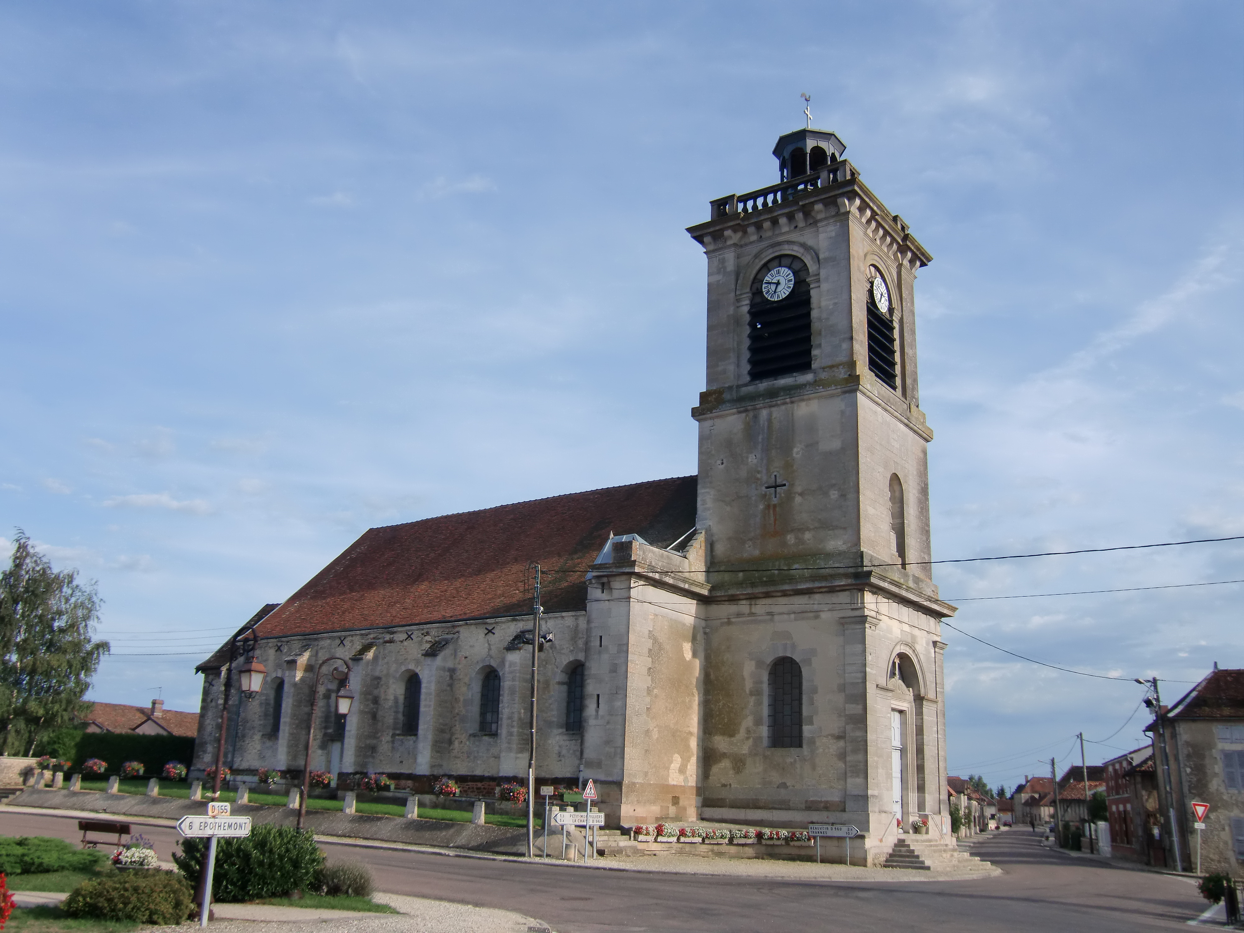 église de Morvilliers (Aube, Champagne, France)